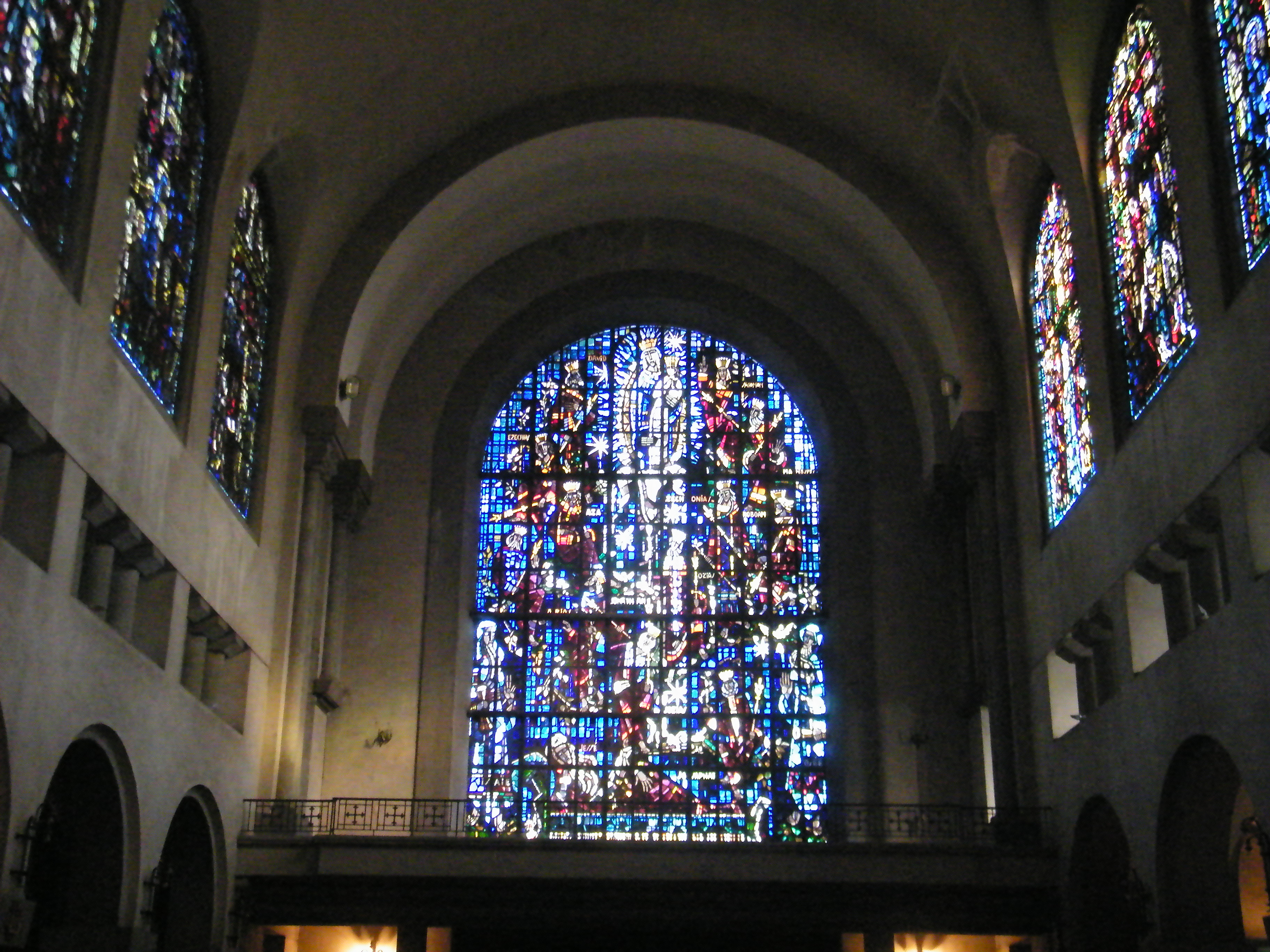 Imágenes del santuario de Lourdes (Chile), Basílica.